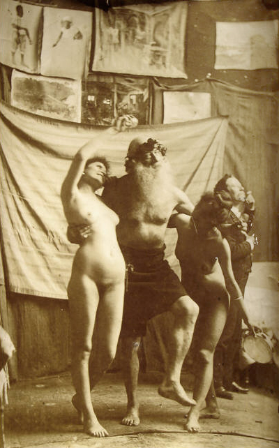 Modelos no atelier. Na extrema direita, o pintor Pedro Weingärtner